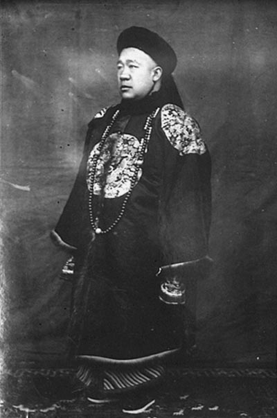 清肅親王·善耆